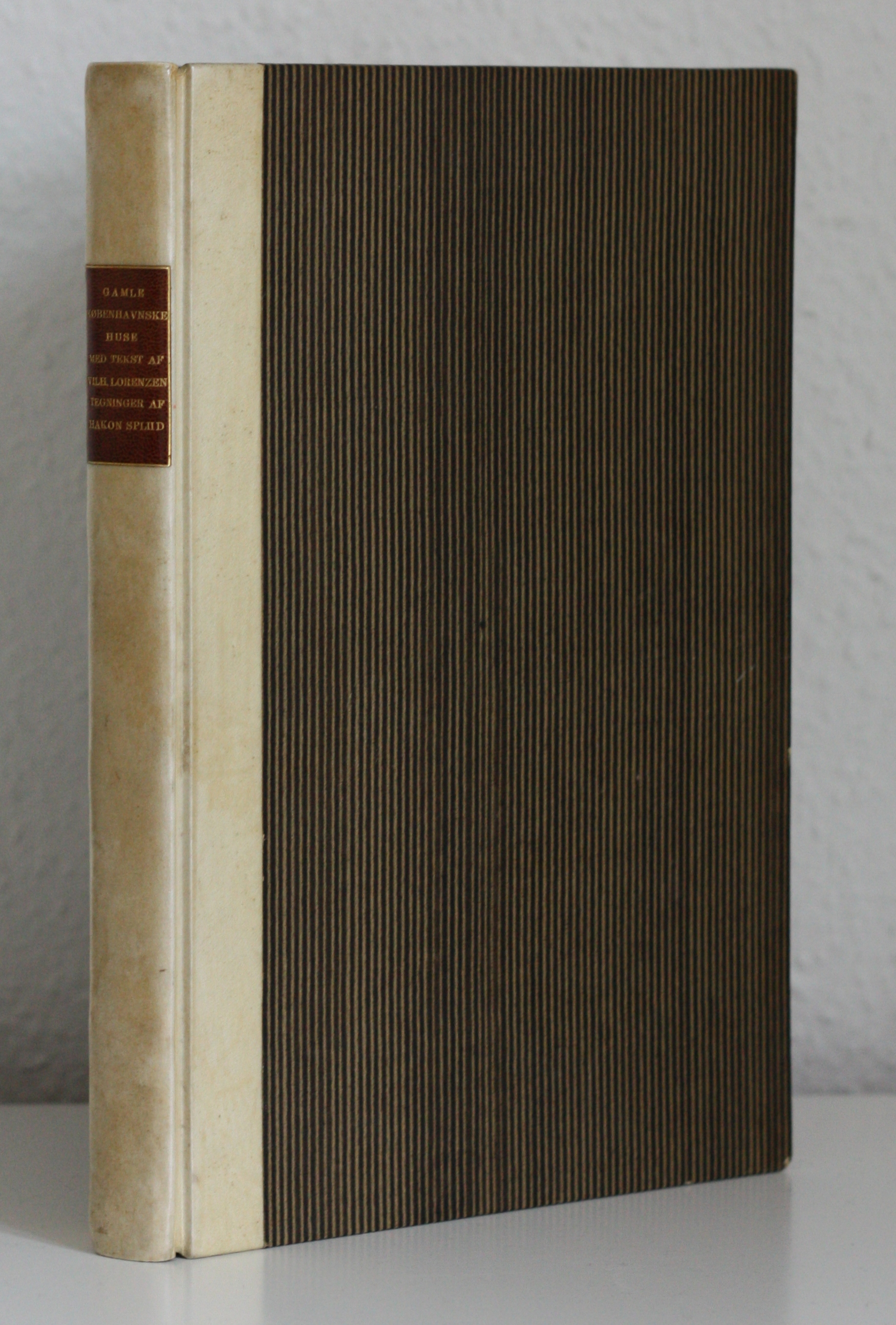 Et eksempel på August Sandgrens stribede sidepapir på et halvbind af pergament.